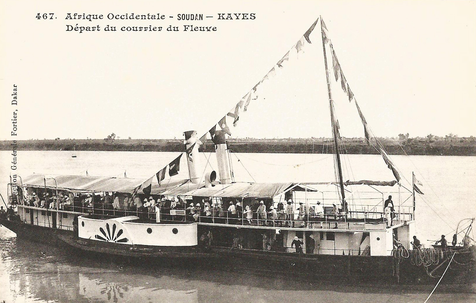 François-Edmond Fortier, Kayes. Départ du courrier du fleuve. Afrique Occidentale - Soudan.